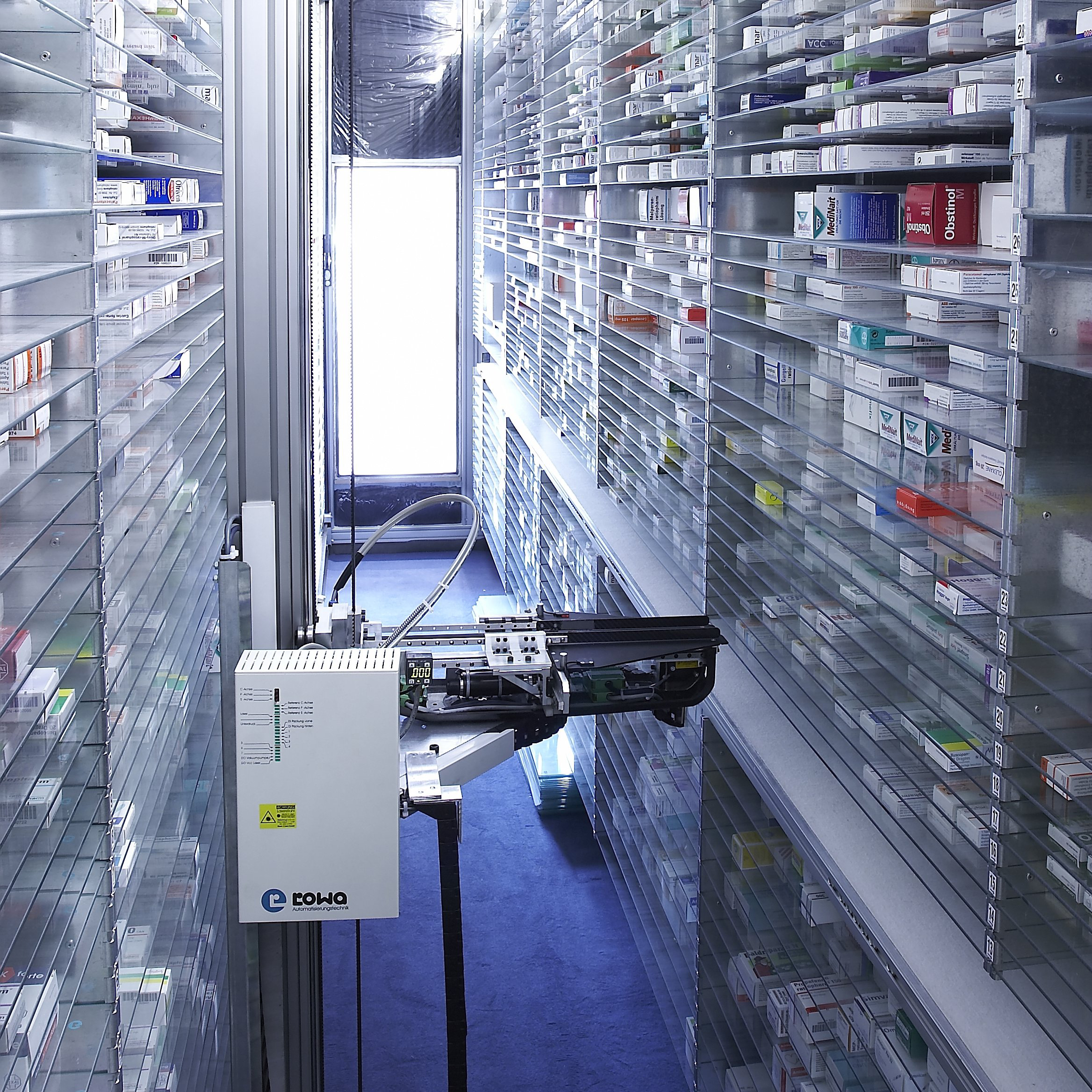 Das Bild zeigt die Innenansicht eines Kommissionierautomaten.